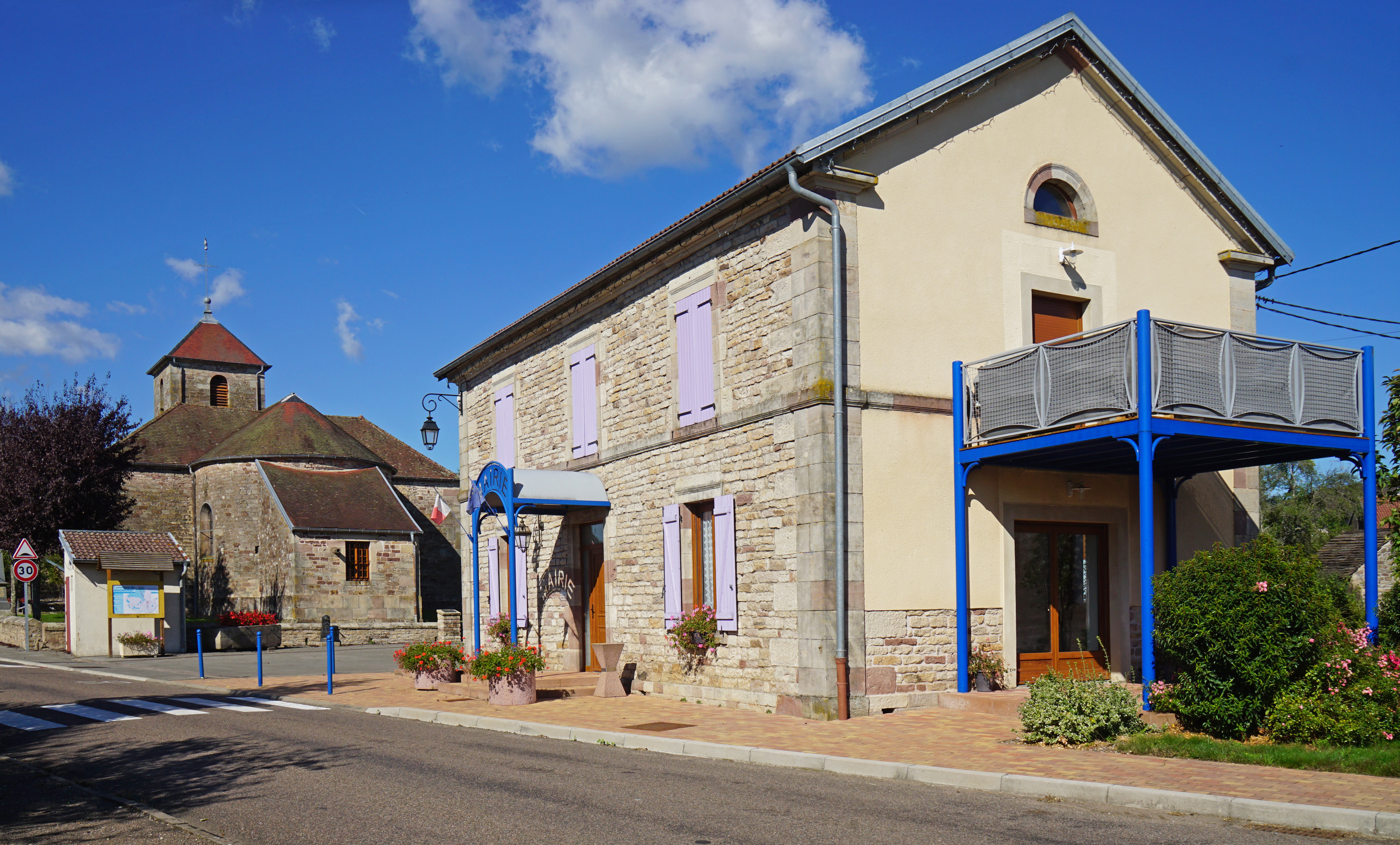 La mairie et l'église de Magnivray.